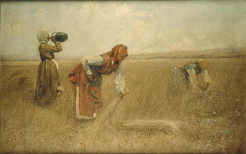 "Жътварки"